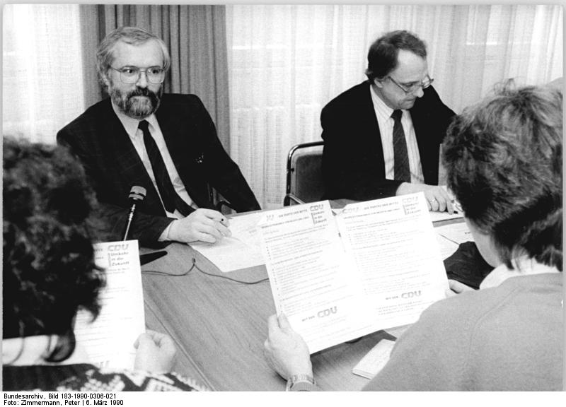 ADN-ZB Zimmermann 6.3.1990 Le Berlin: Wahlkampf. CDU-Pressesprecher Helmut Lück (l.) informierte in Berlin vor Journalisten über Behinderungen seiner Partei im Wahlkampf. Mittels gefälschten Wahlhandzettel, die im Stadtbezirk Prenzlauer Berg auftauchten, werde von unbekannter Seite versucht, Wähler gegen die CDU zu vereinnahmen.